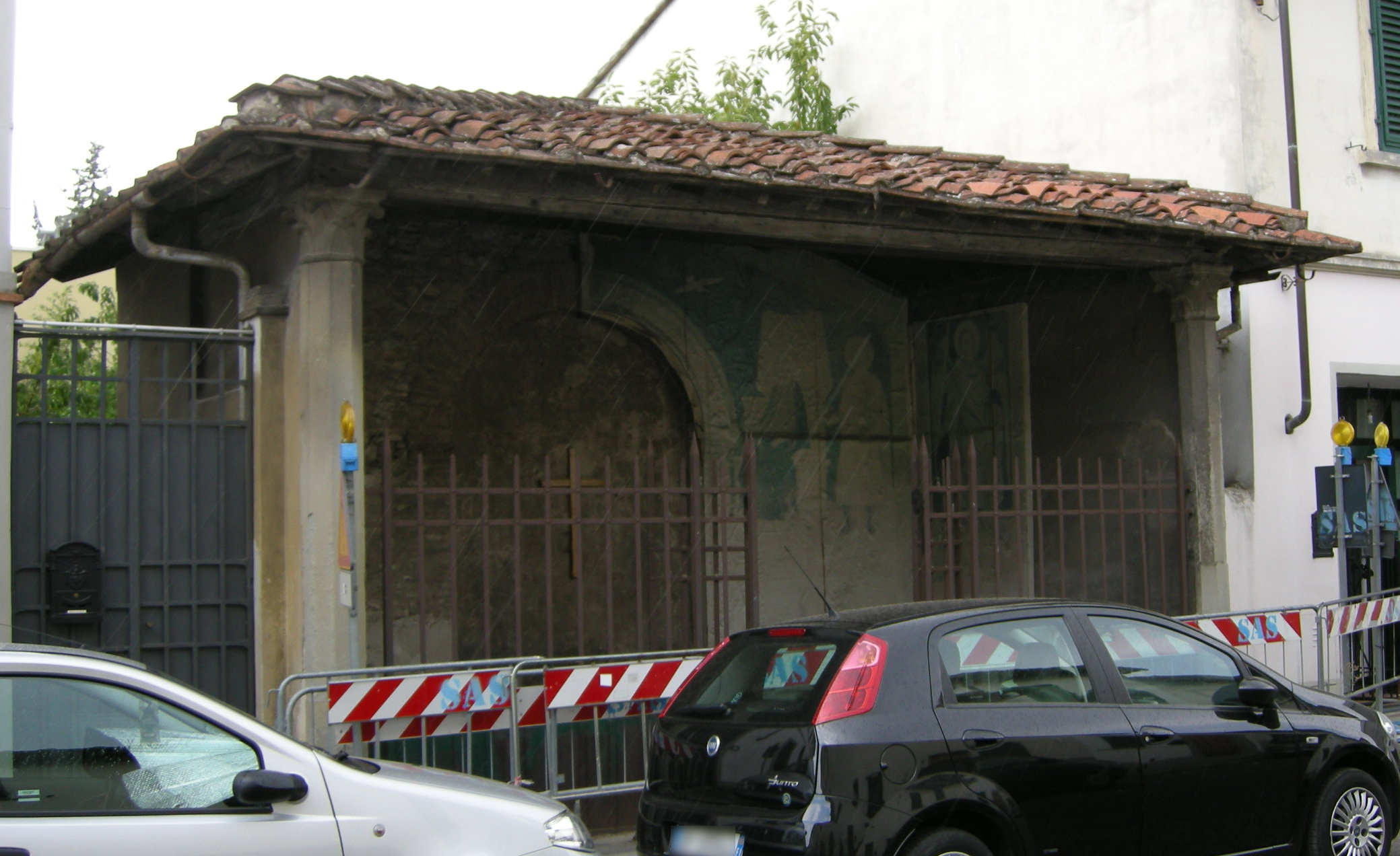 Tabernacolo dell'olmo